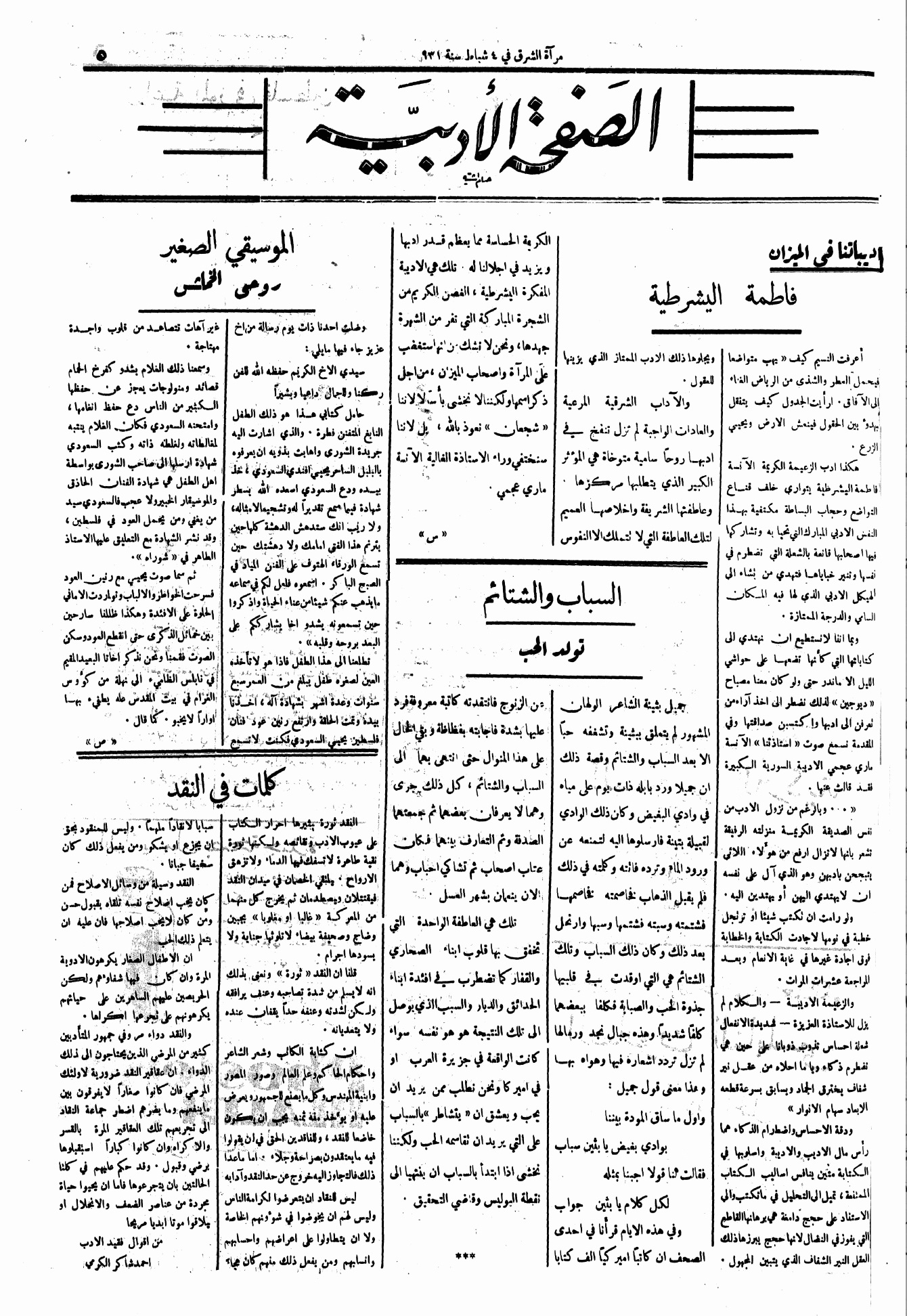 مقال عن فاطمة اليشرطية في صحيفة مرآة الشرق 4 شباط 1931